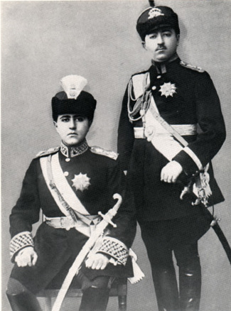 Portrait de Ahmad Shah Qajar (g) et de son frère Mohammad Hassan Mirza.